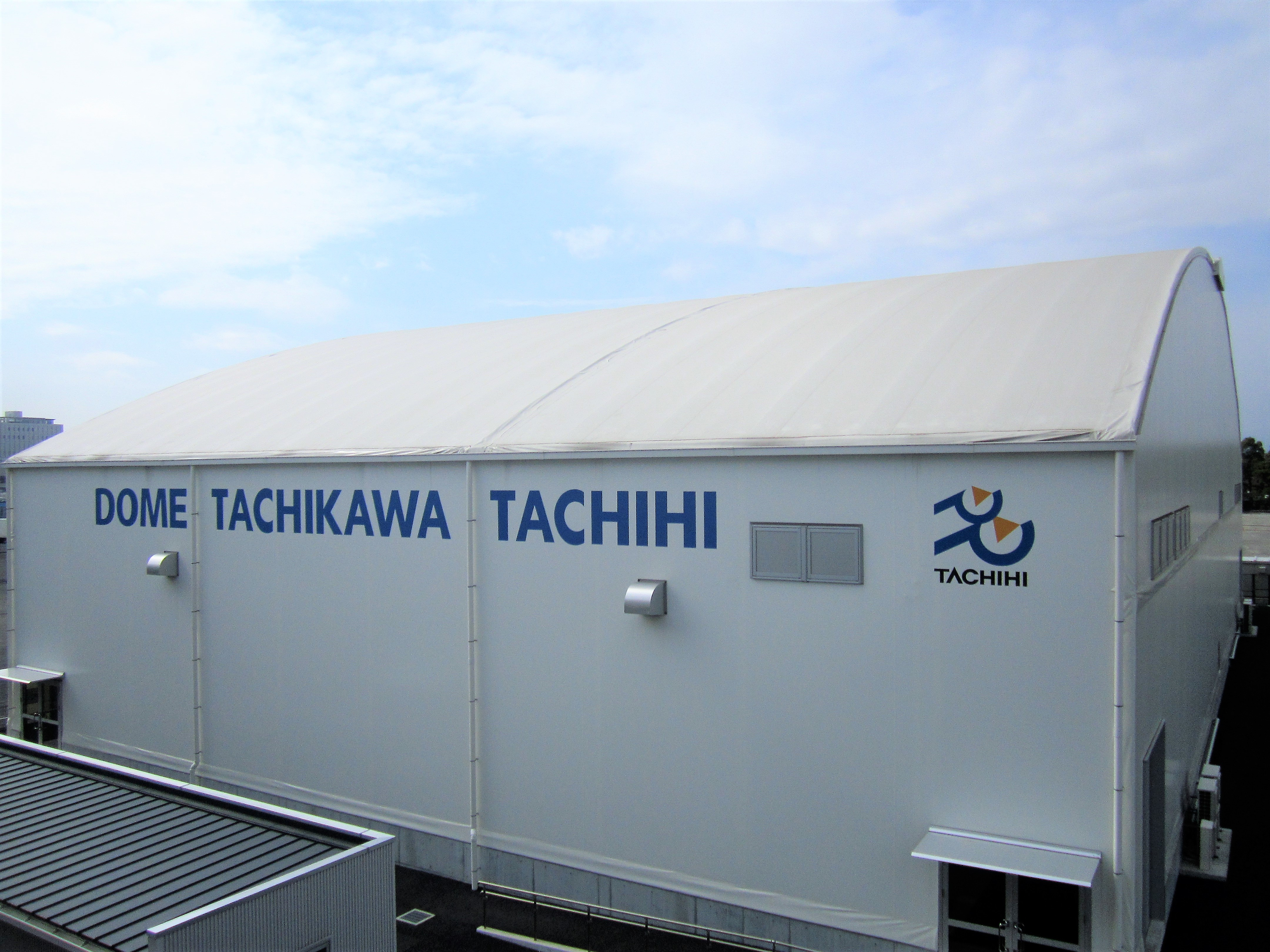 ドーム立川立飛（立川市泉町）